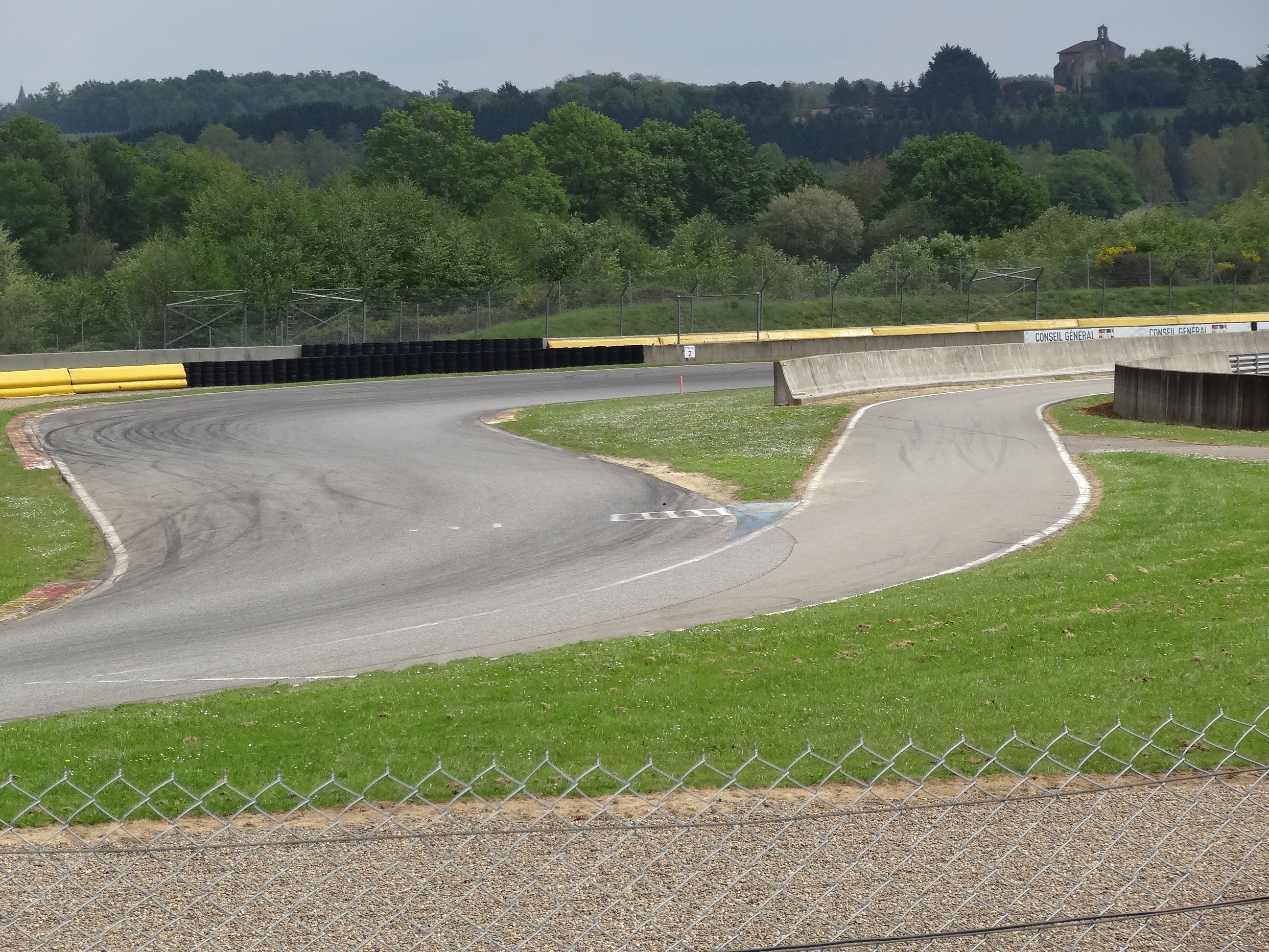 Superbike 2016 Nogaro-34 Circuit Paul Armagnac en avril 2016.